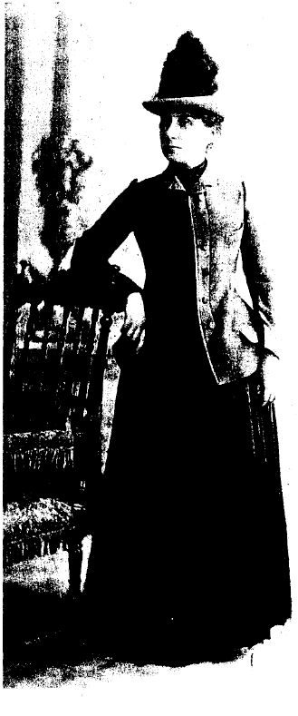 Provenienza: [1]